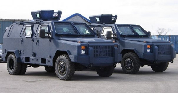 Einsatzwagen der FSK